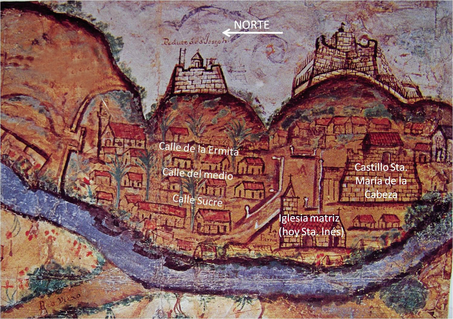 Dibujo de Cumaná del siglo XVII por Luis Daniel Beauperthuy Urich: nos señala y se muestran claramente las tres principales calles, que se trazan a partir de la Iglesia matriz y de la residencia de los gobernantes en la fortaleza de Santa Maria de la Cabeza.Nótese el curso del Río Manzanares.